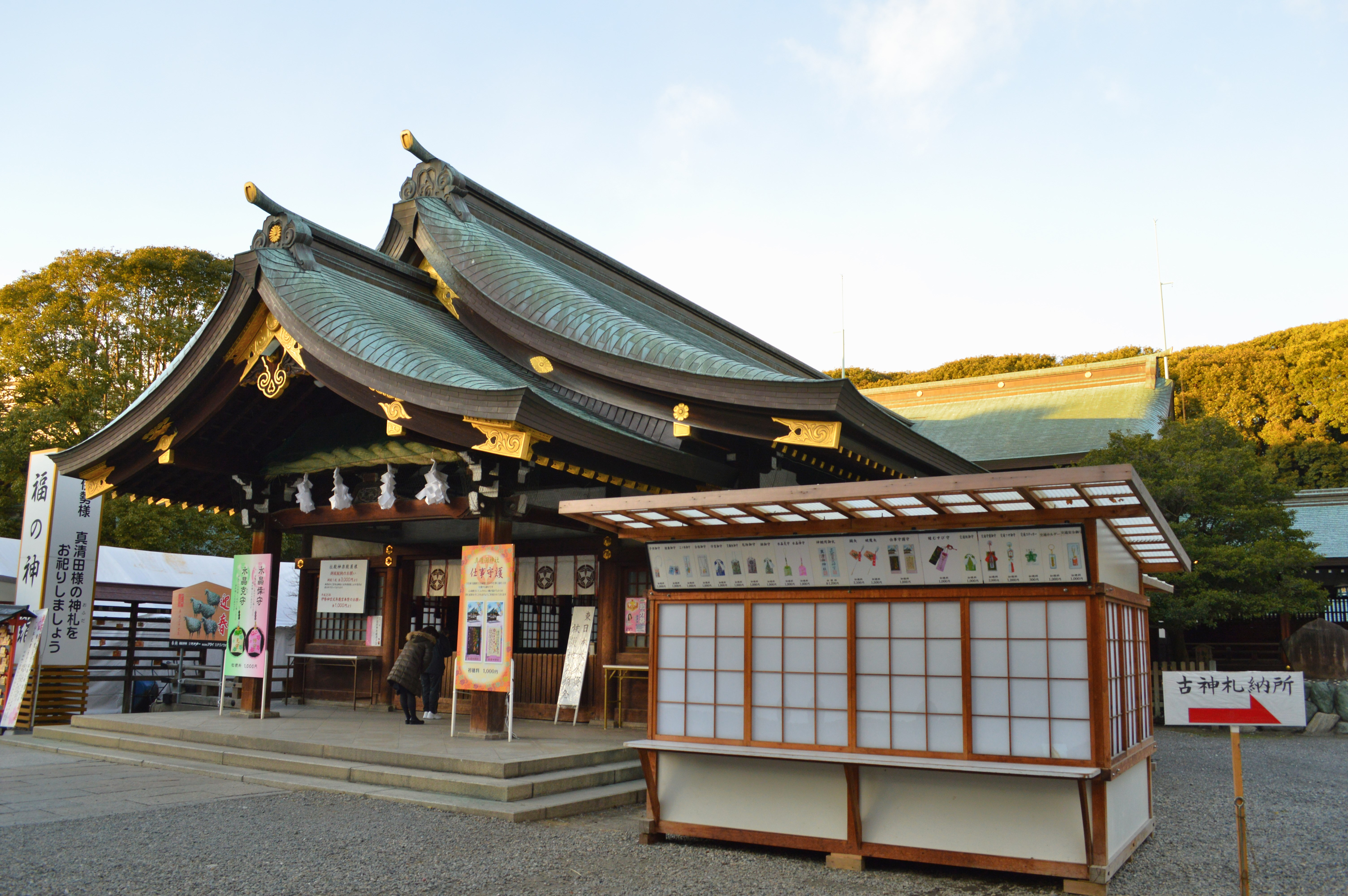 真清田神社 拝殿